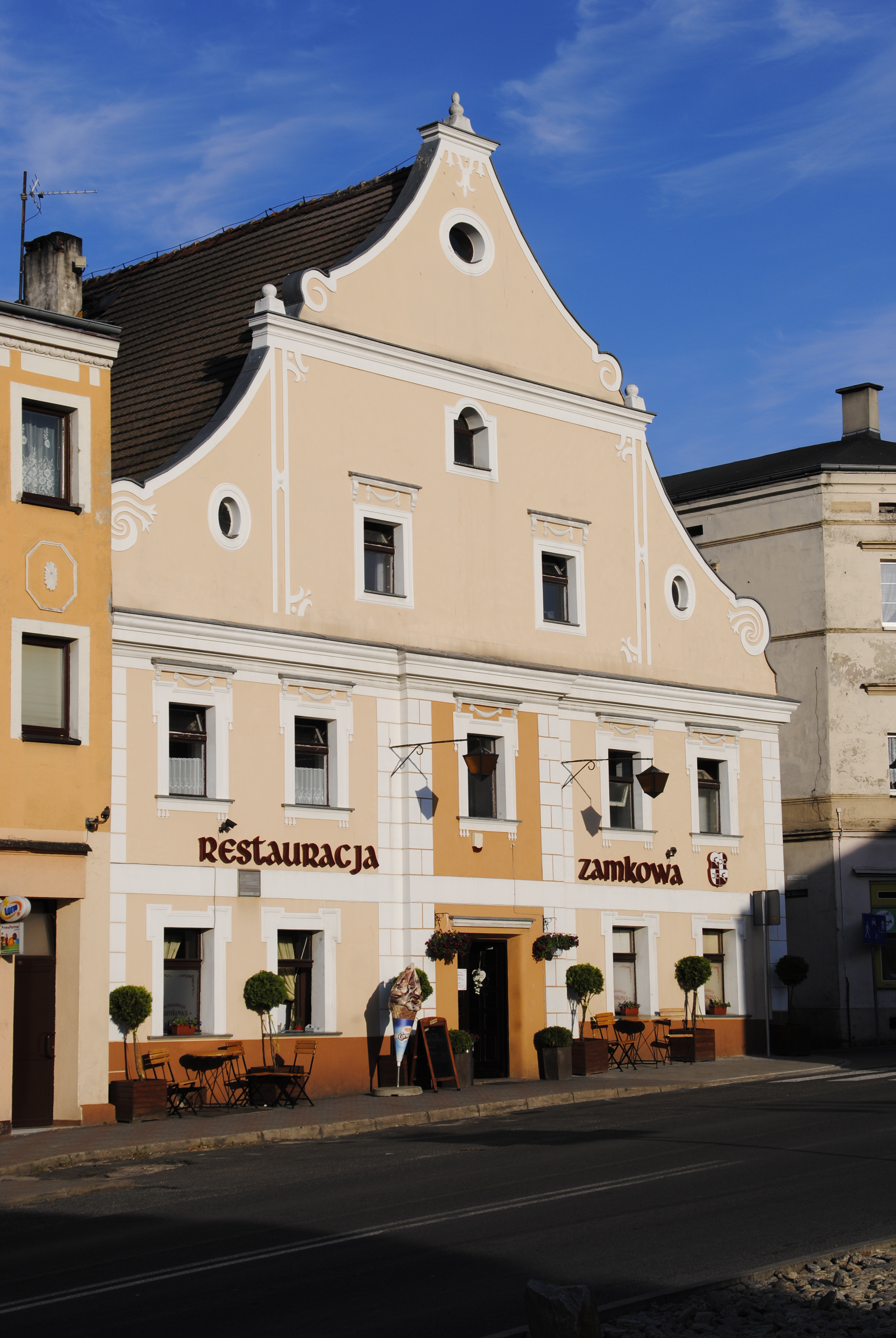 Haus an der ul. Zawadzkiego 36 in Proskau (Ring)